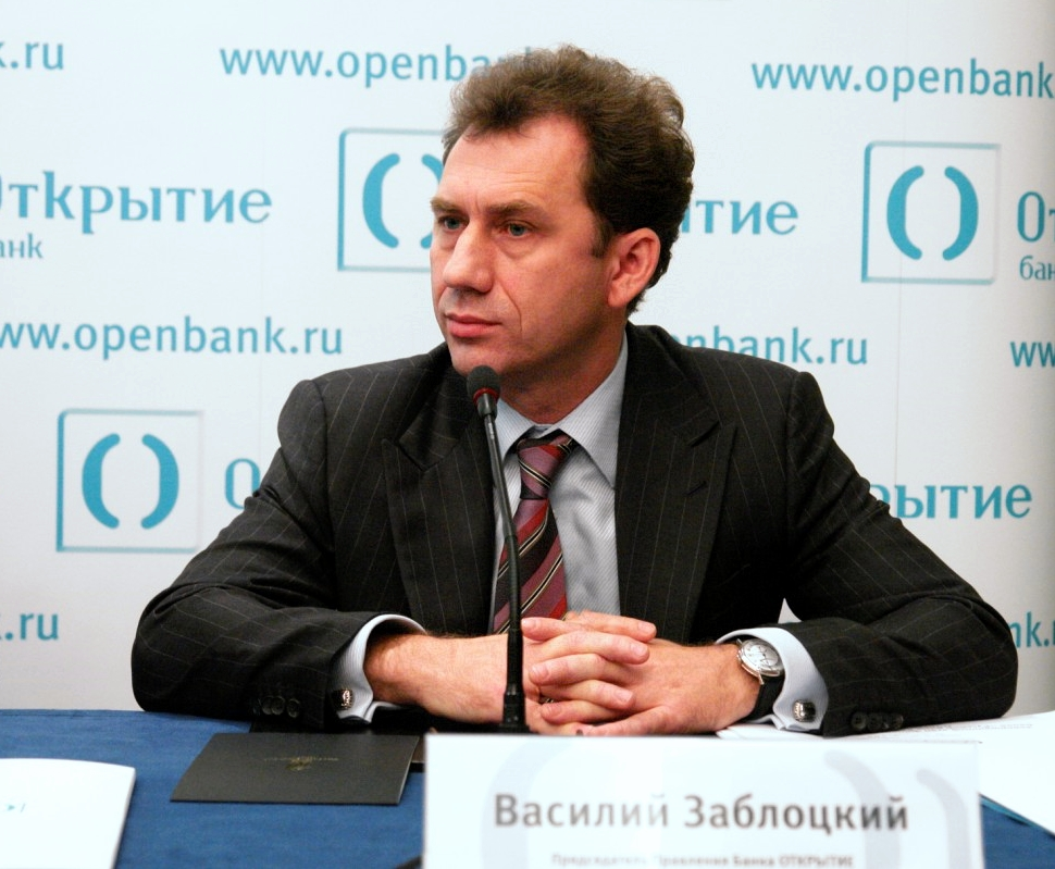 Василий Васильевич Заблоцкий, председатель правления Банка Открытие (2009-2011).